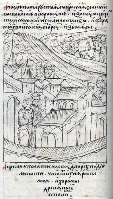 А после пожара находился царь и великий князь (Иван IV Грозный) в своём селе Воробьёве со своей царицей великой княгиней Анастасией, со своим братом князем Юрием и с боярами; а церкви и палаты на своём дворе велел отстраивать, те, что от огня распались, и деревянные хоромы ставить.